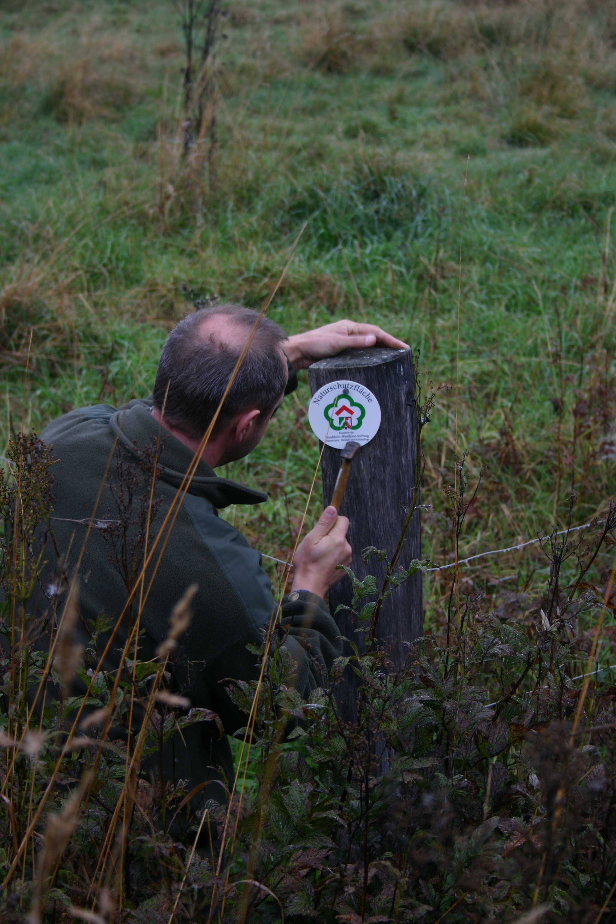 Anbringen eines Schildes der NRW-Stiftung an einer Stiftungsfläche im Naturschutzgebiet Hillenbachtal im stadtgebiet Winterbeg.